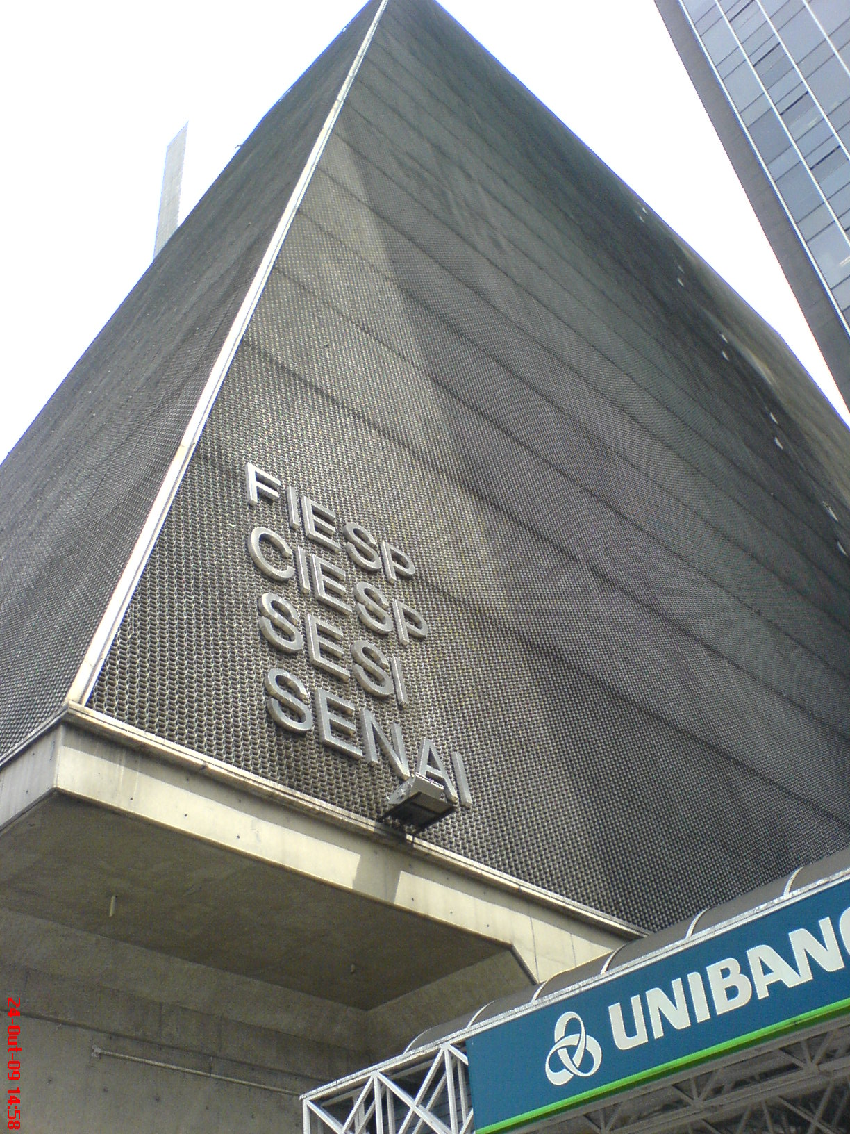 Predio da FIESP, CIESP,SESI e SENAI na Av Paulista - Sao Paulo SP